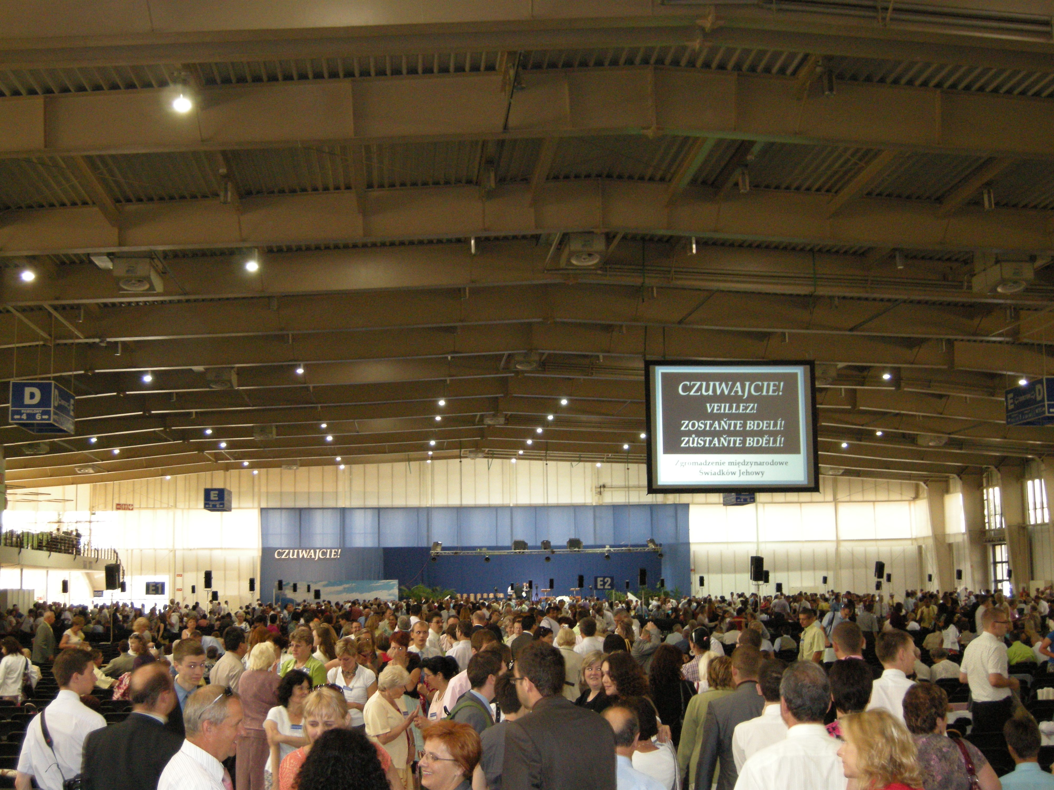 Międzynarodowe Zgromadzenie w Poznaniu 2009.